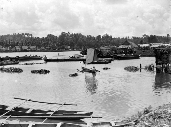 Negatief. Gezicht op de buiten haar oevers getreden Manado-rivier te Manado, Minahasa, Noord-Celebes